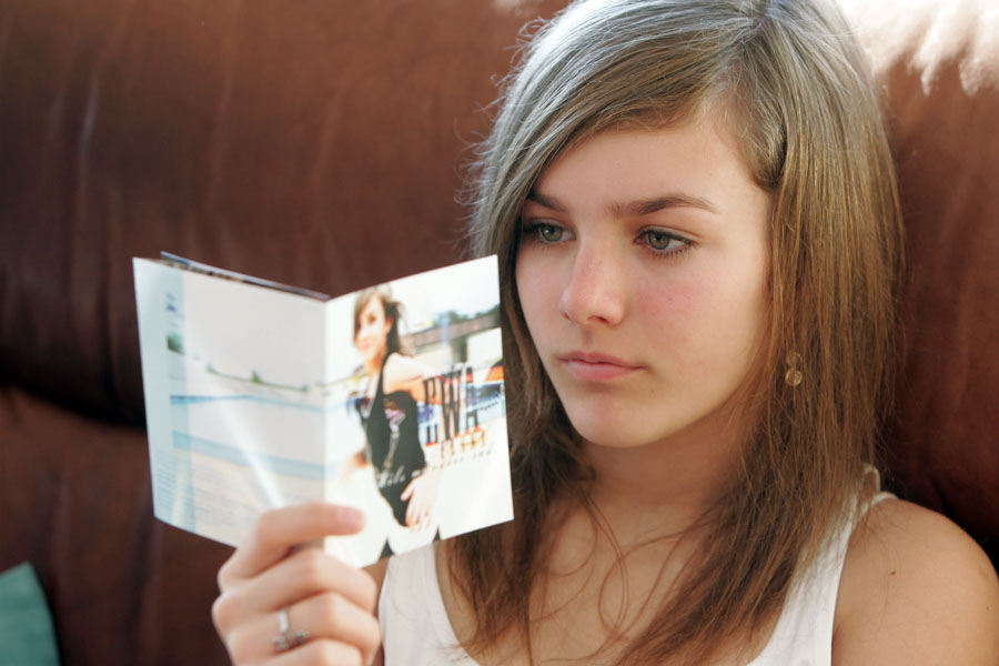 Ewa Farna